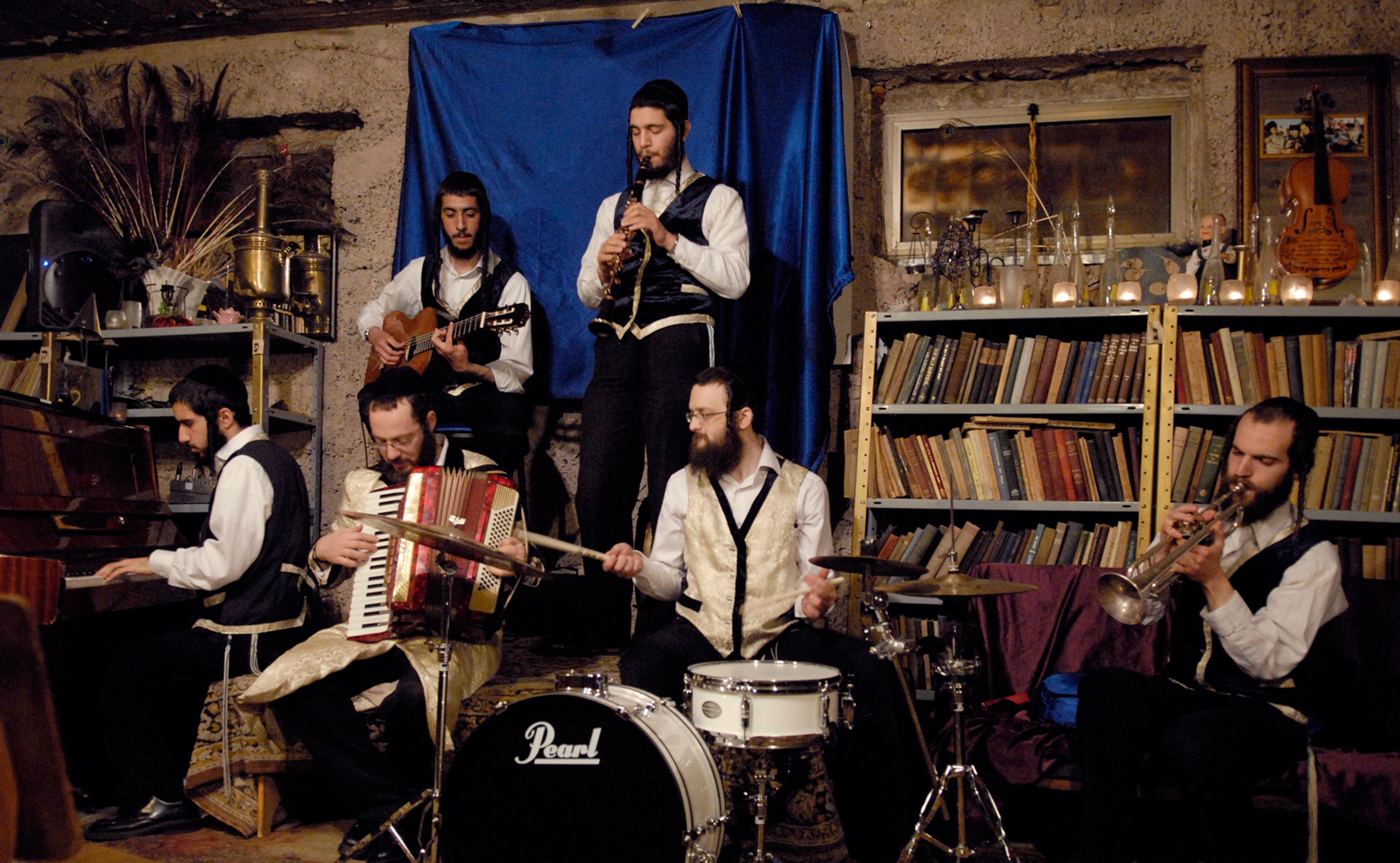 חלק מנגני הכליזמר בנגינה במרתף האגודה בירושלים